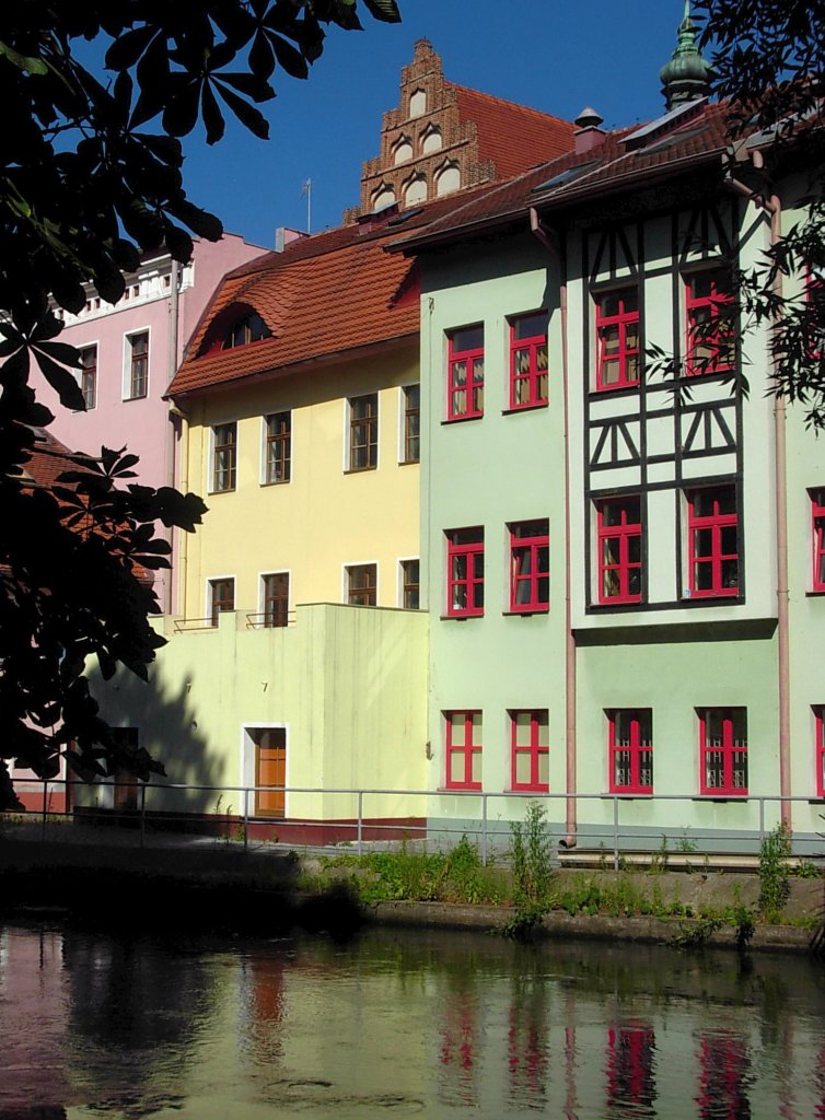 Ulica Przyrzecze w Bydgoszczy, Wenecja Bydgoska